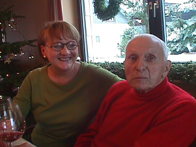 Bild von Max Rupp und Margot Domeyer